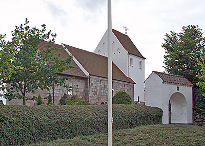 Adslev Kirke, Hørning Kommune, Hjelmslev Herred, Århus Amt, Denmark